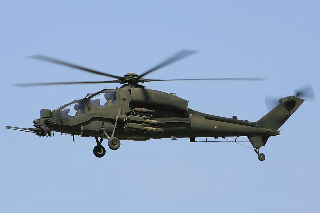 Mangusta - RIAT 2005